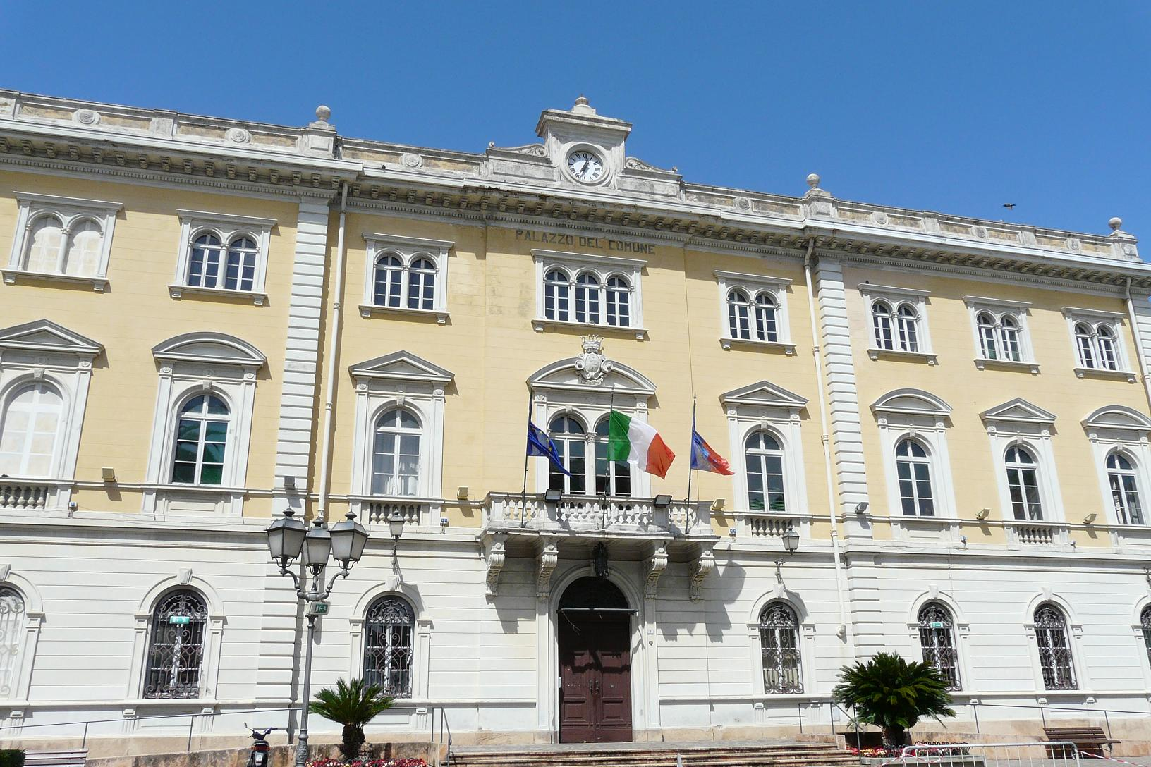 Palazzo municipale di Alassio, Liguria, Italia